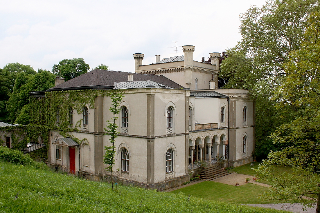 Südseitige Ansicht der Villa Pereira in der niederösterrichischen Ortschaft Wördern, Marktgemeinde St. Andrä-Wördern